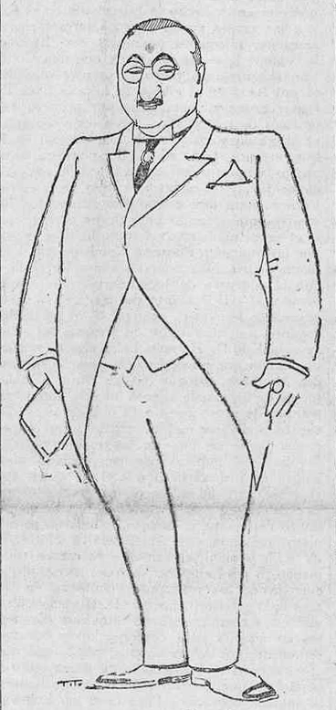 José Francés.